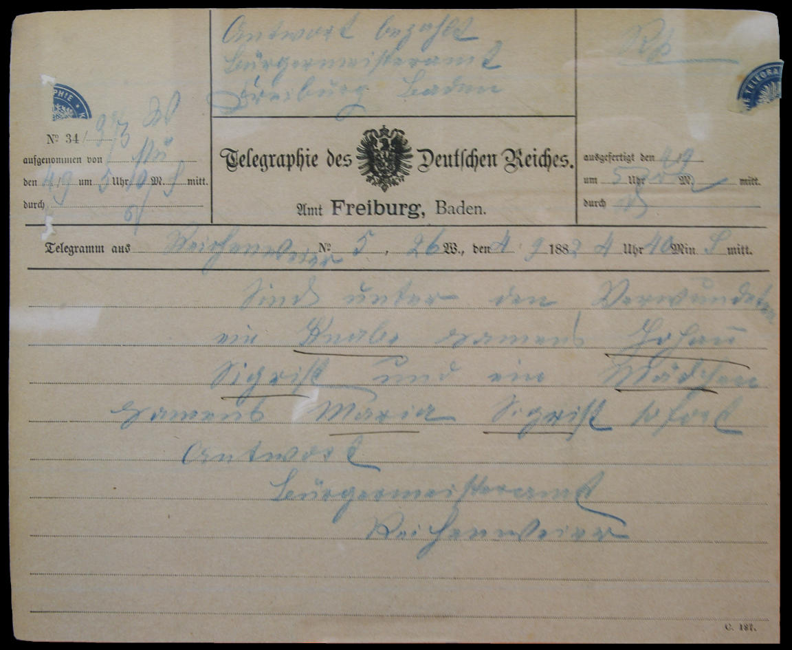 Dokumente zum Zugunglück in Hugstetten am 3. September 1882 Text: Antwort bezahlt Bürgermeisteramt Freiburg Baden Telegramm aus Reichenweier [Nummer und Datum] Sind unter den Verwundeten ein Knabe namens Johann Sigrist und ein Mädchen namens Maria Sigrist sofort Antwort Bürgermeisteramt Reichenweier